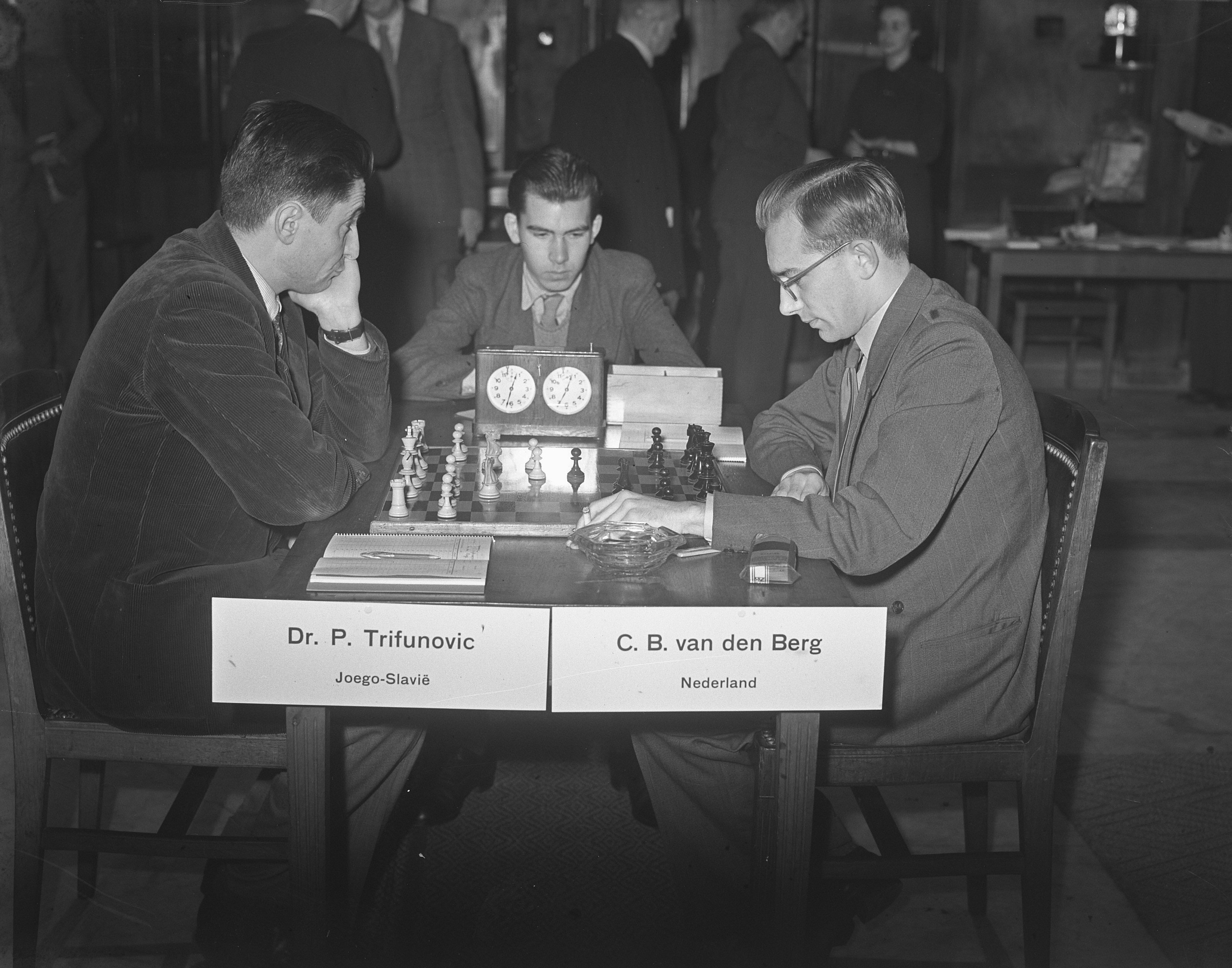 Collectie / Archief : Fotocollectie Anefo Reportage / Serie : [ onbekend ] Beschrijving : Wereldschaaktoernooi eerste dag; Trifunovic tegen Van den Berg Datum : 11 november 1950 Locatie : Amsterdam, Noord-Holland Trefwoorden : schaken, sport Fotograaf : Pot, Harry / Anefo Auteursrechthebbende : Nationaal Archief Materiaalsoort : Glasnegatief Nummer archiefinventaris : bekijk toegang 2.24.01.09 Bestanddeelnummer : 904-2918